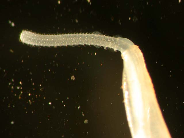 Rhadinorhynchus